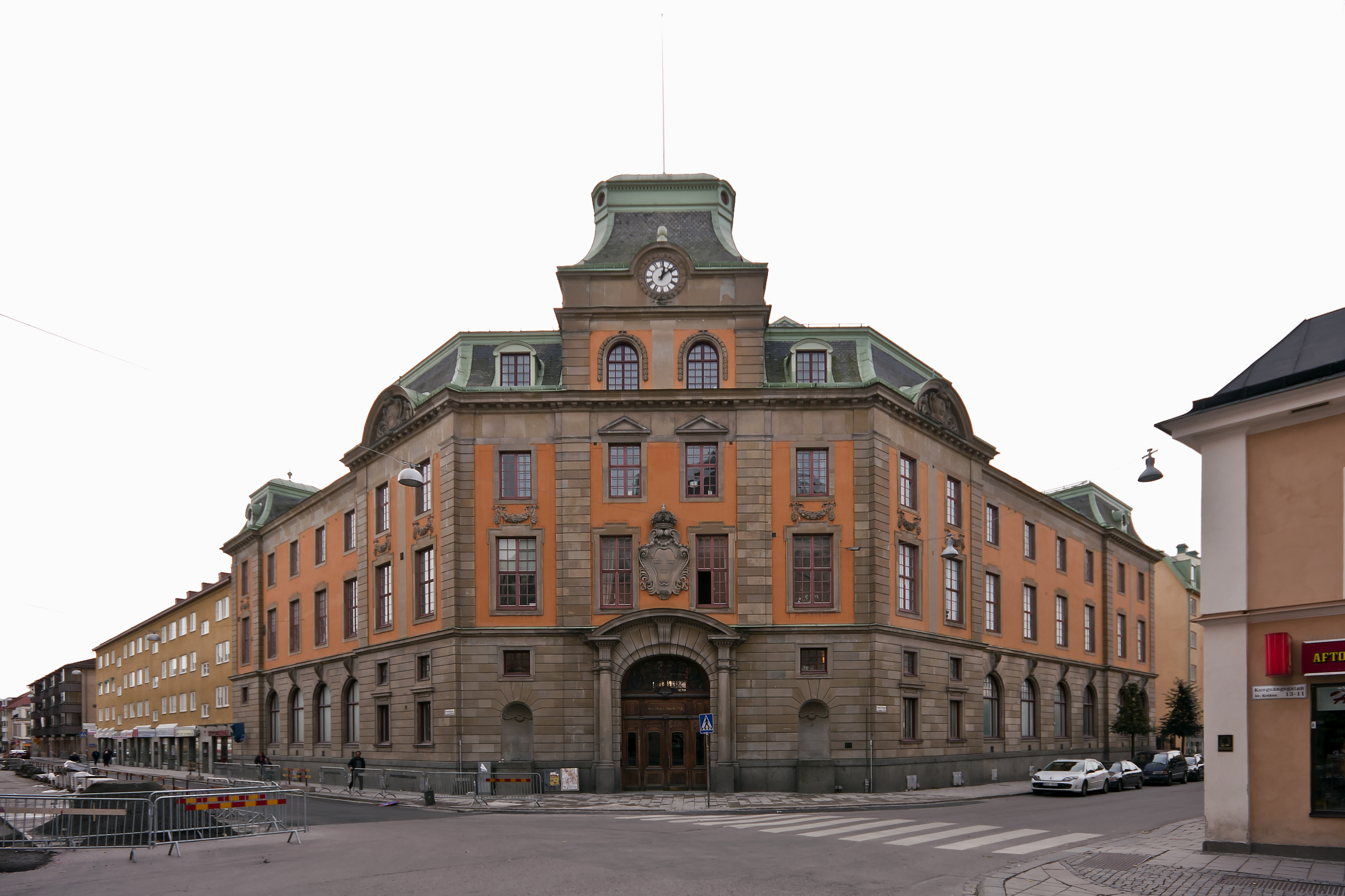 Gamla Riksbankshuset på Kungsängsgatan 17 i Uppsala.Arkitekter Ullrich & Hallquisth. Byggnadsår 1903